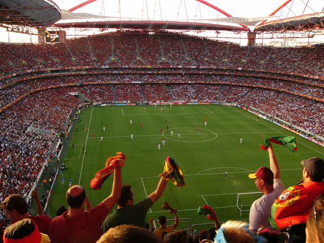 Luz-Stadion während des EM-Finales Fotograf: Fritz Duras